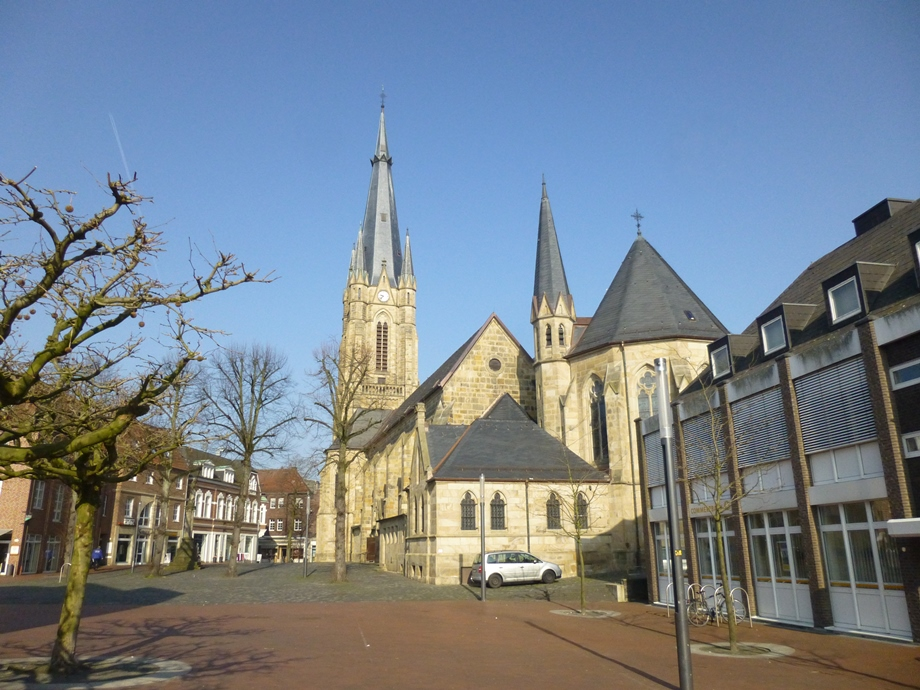 Emsdetten St. Pankratius Kirche, Bild: Wolfgang Schindler